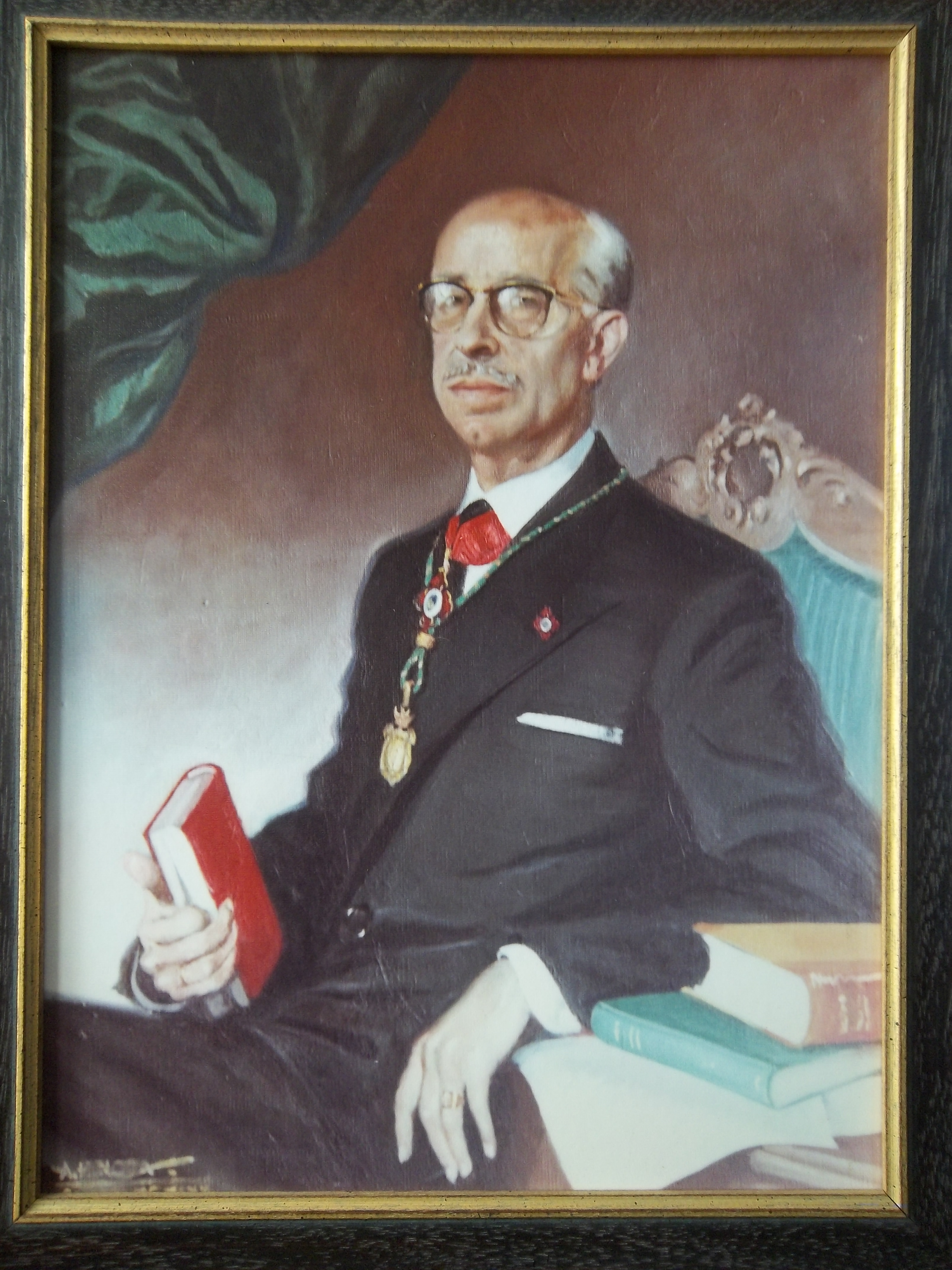 Fotografía de la reproducción de la familia Cazenave del cuadro al óleo que se conserva en el Aula Magna de la Facultad de Ciencias Económicas y Empresariales de la Universidad de Granada